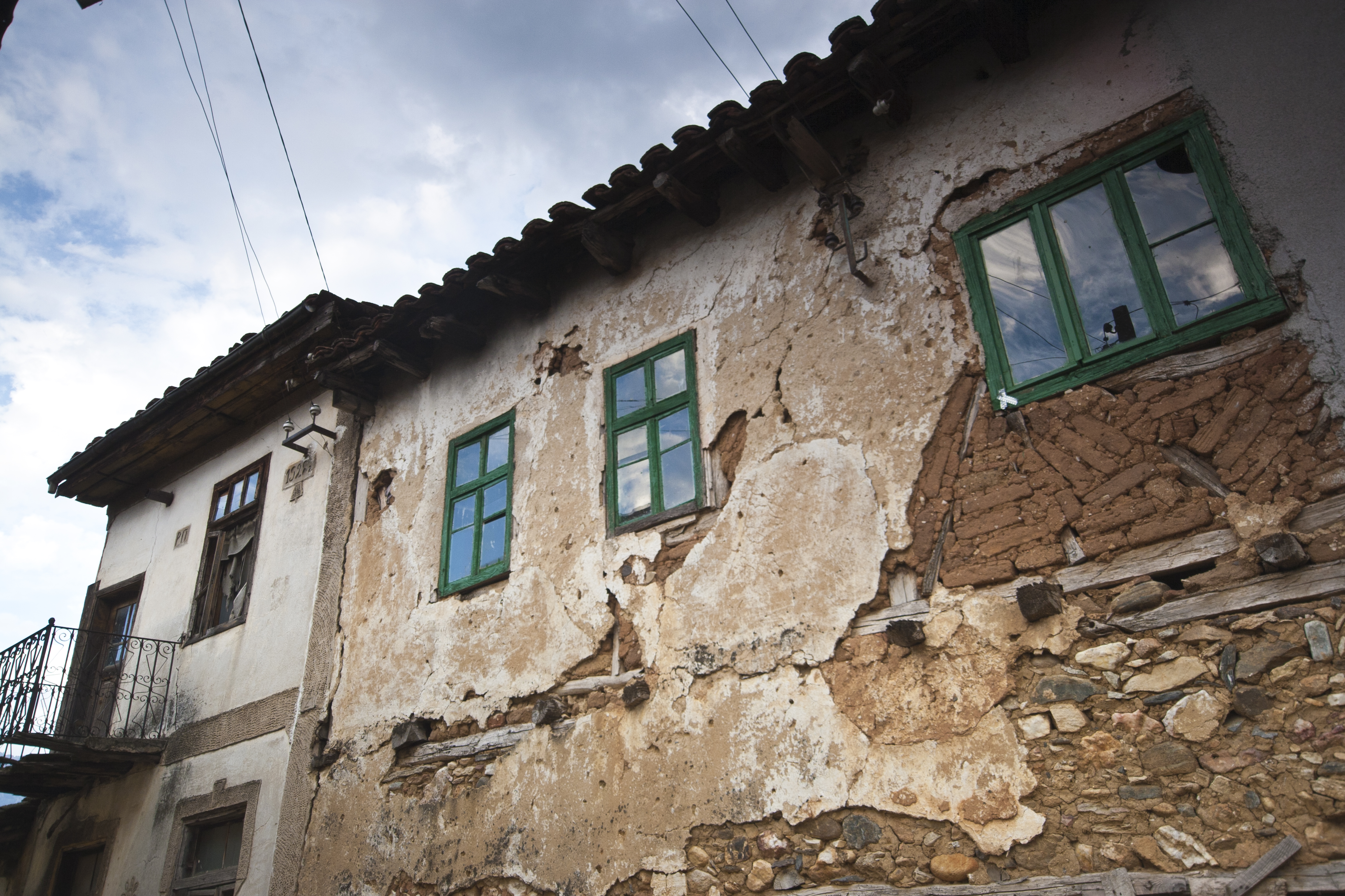 Стара куќа, Богомила